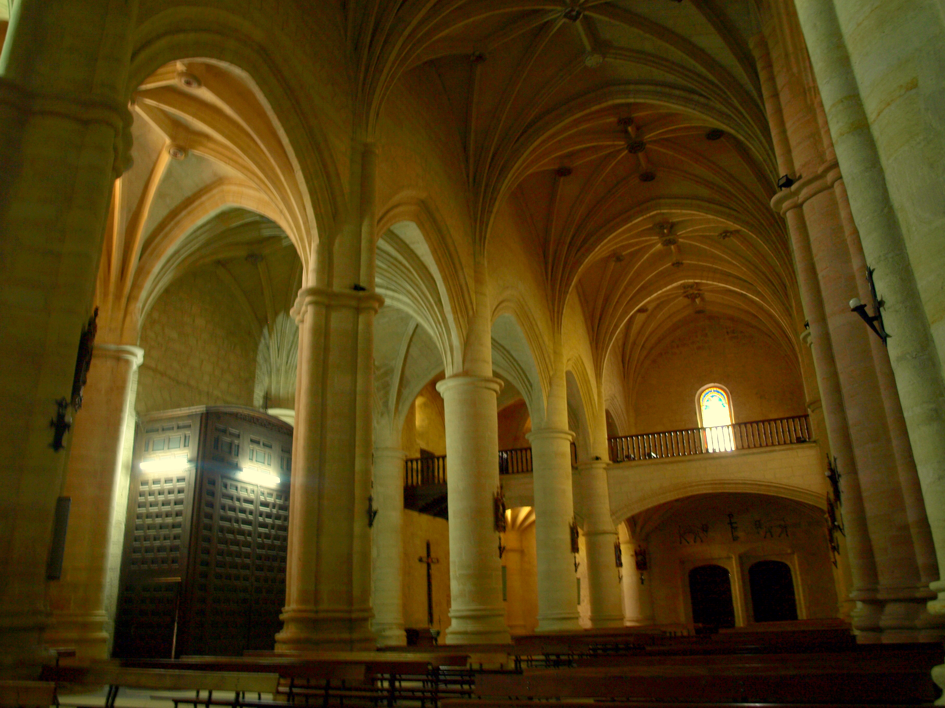 Interior de la Iglesia de la Natividad de Carrascosa del Campo, imagen tomada desde el altar